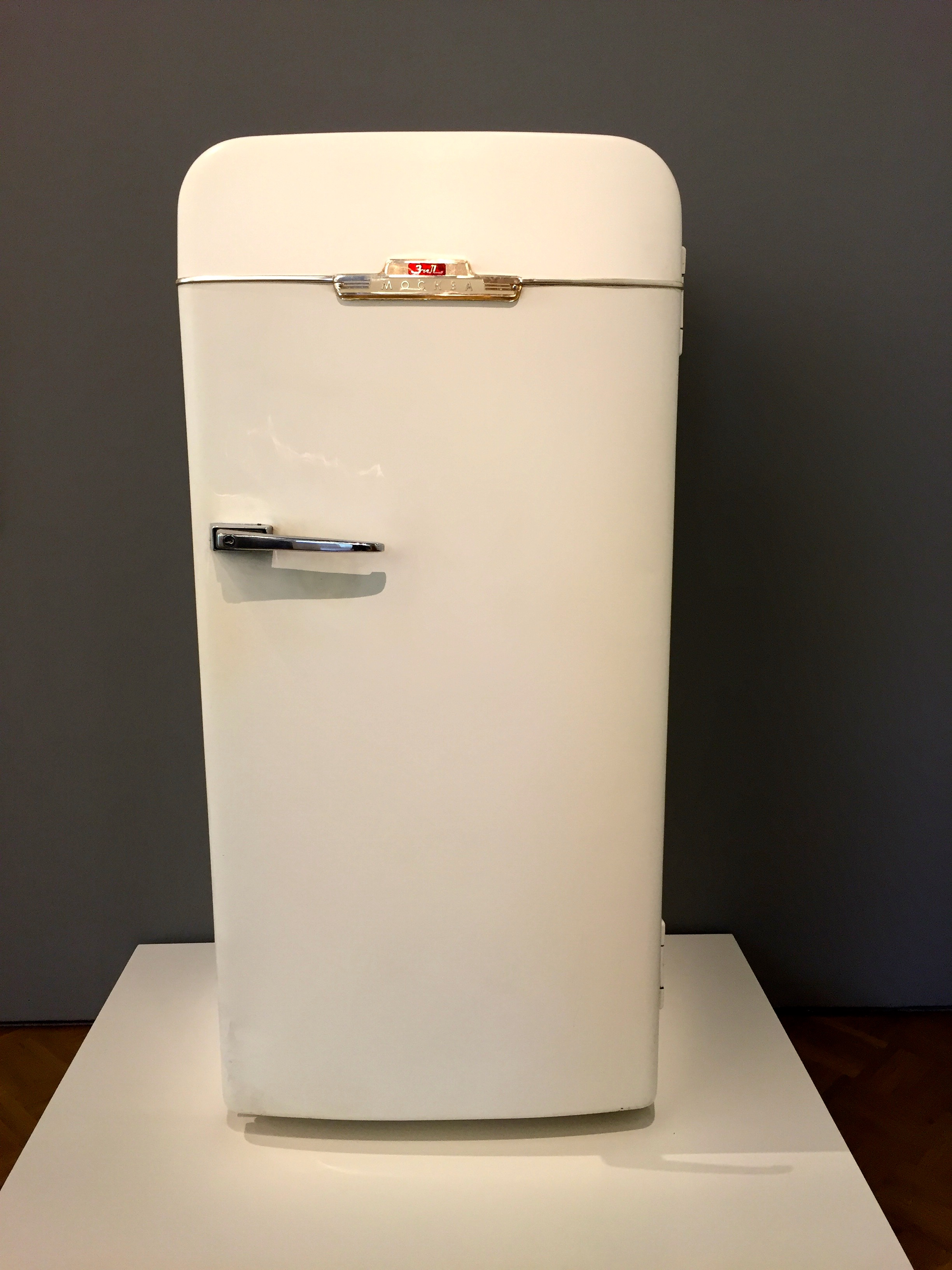 Zil KH-240 Electric Refrigerator. Produced from 1960 - 1969 by Zavod Imani Likhachova Zil (Likhachov Plant). Tot aan de jaren vijftig is de consumptiecultuur het communisme vreemd. In 1959 komt daar verandering in als een tentoonstelling in Moskou de ‘American way of living'* presenteert.